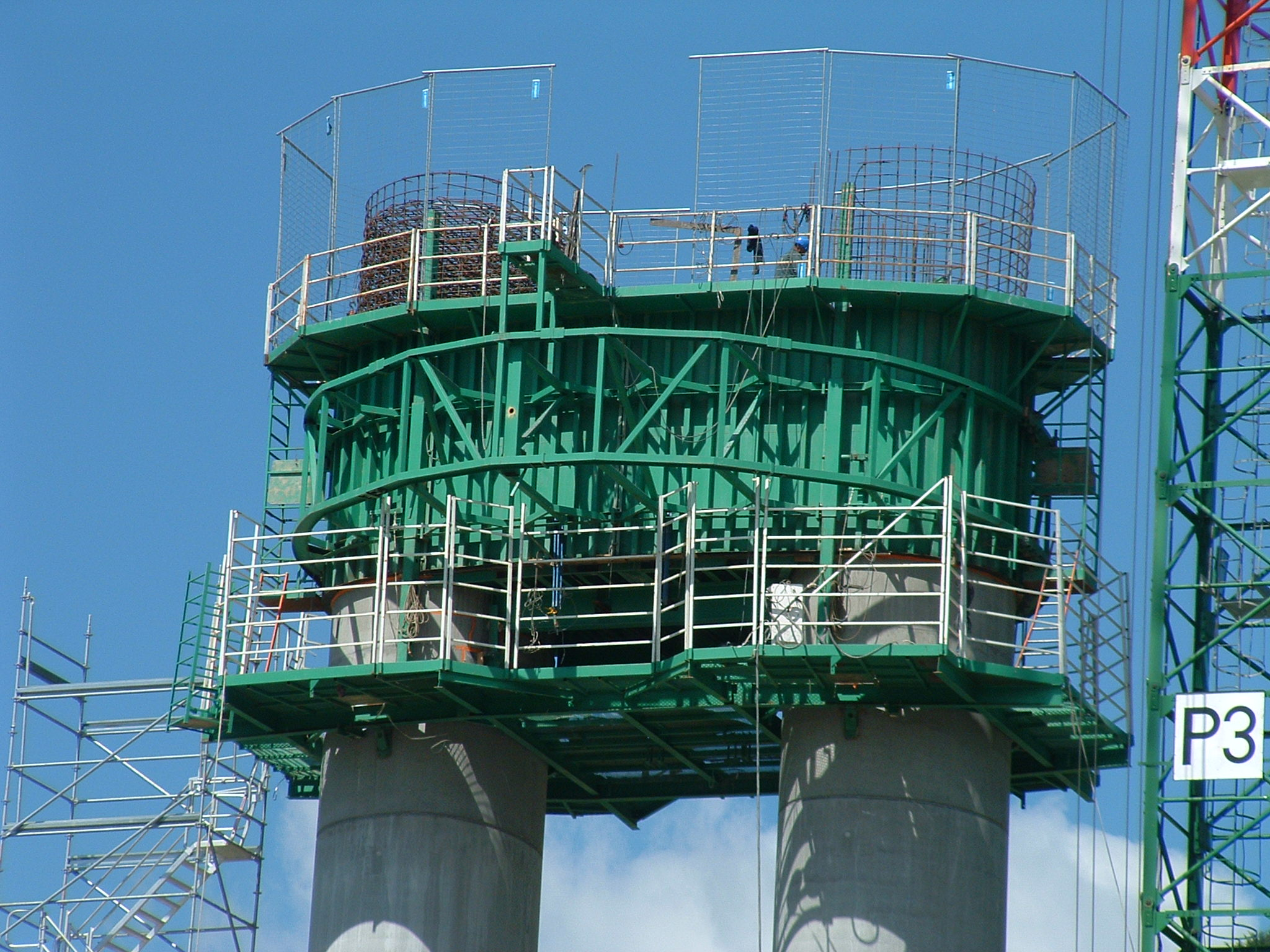 Viaduc de Monestier - Construction - Réalisation du chevête